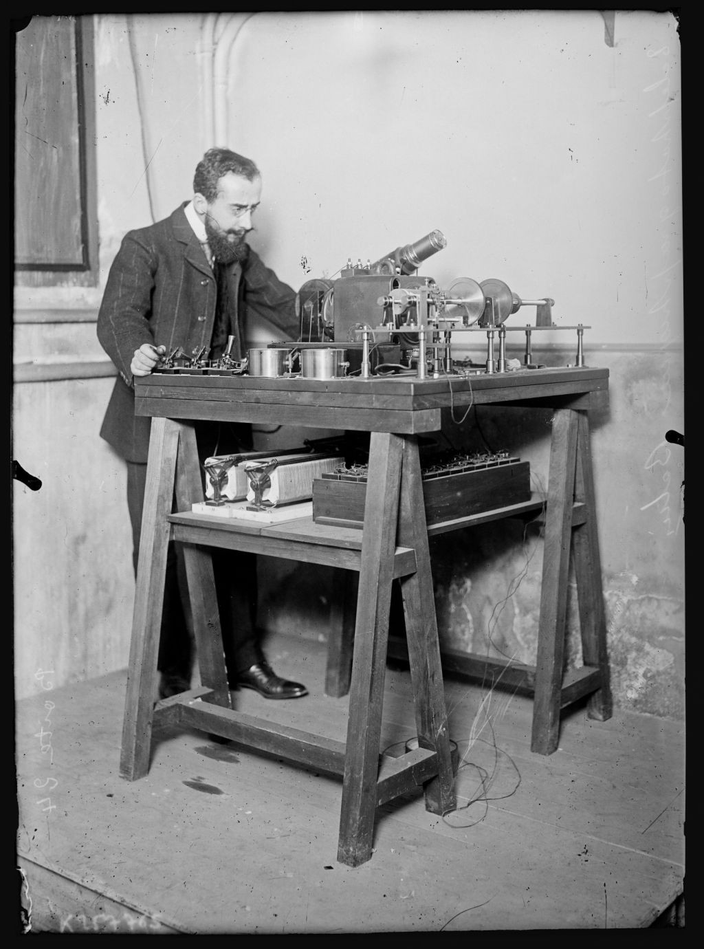 Édouard Belin et son appareil téléphotographique en 1907.